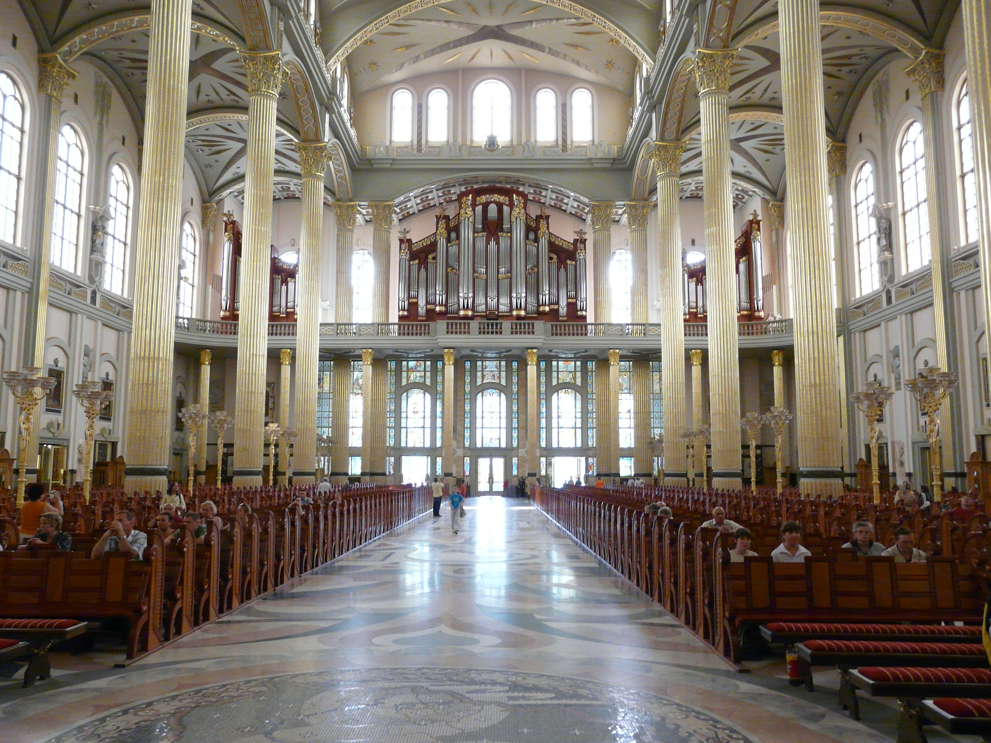 Licheń